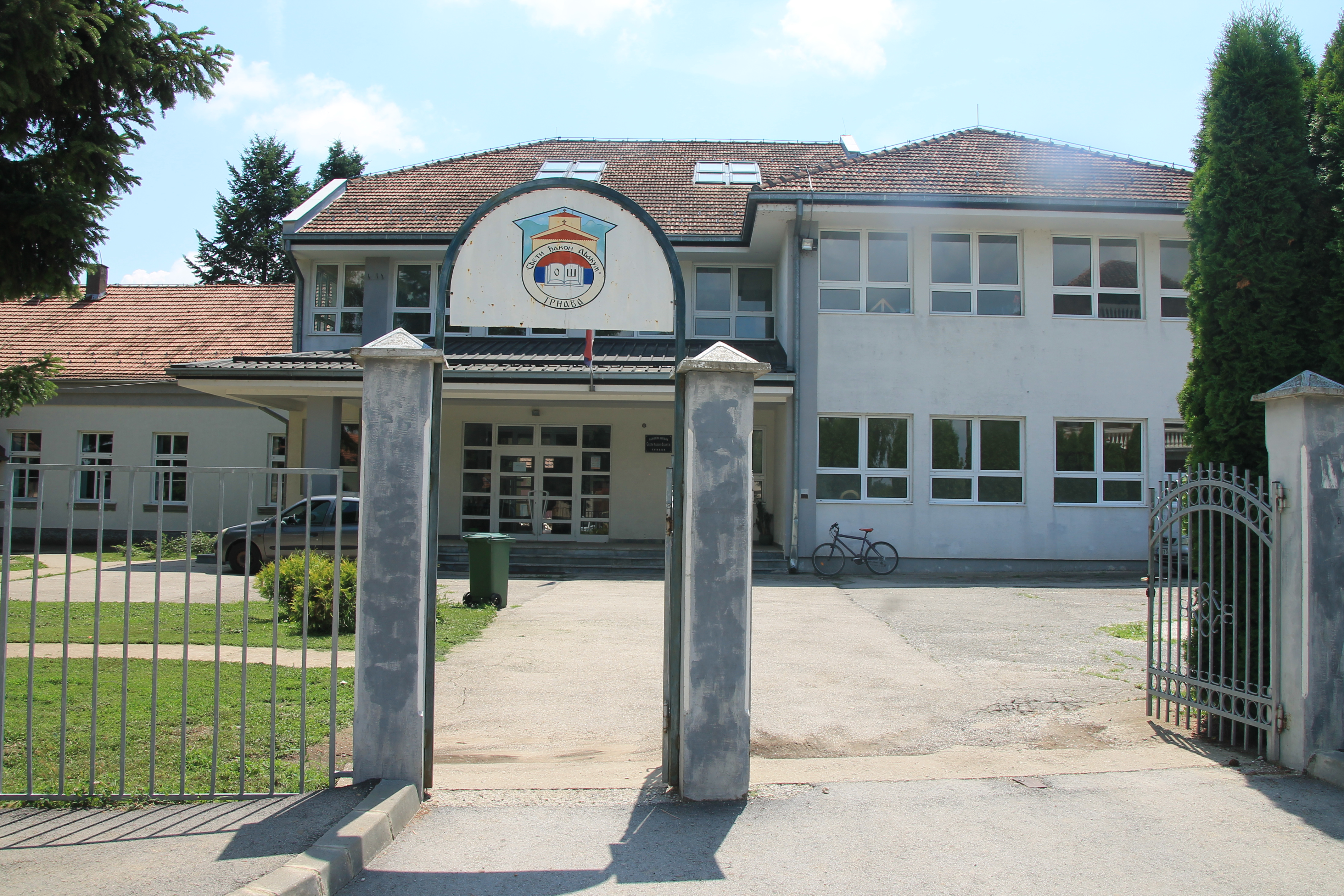 OŠ „Sveti Đakon Avakum” Trnava